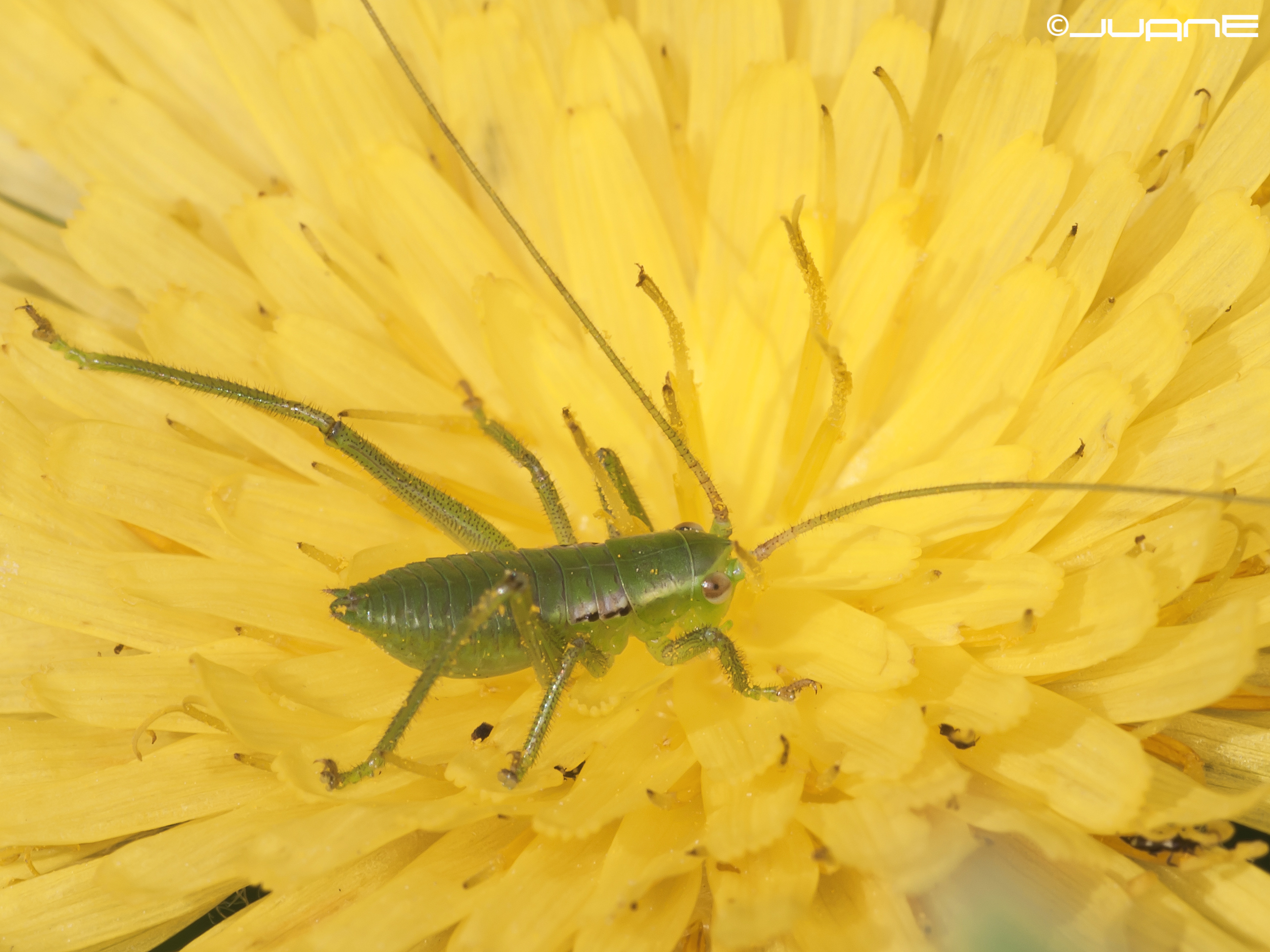 E-330 + Sigma 105mm 1/ 2.8 macro + EX-25